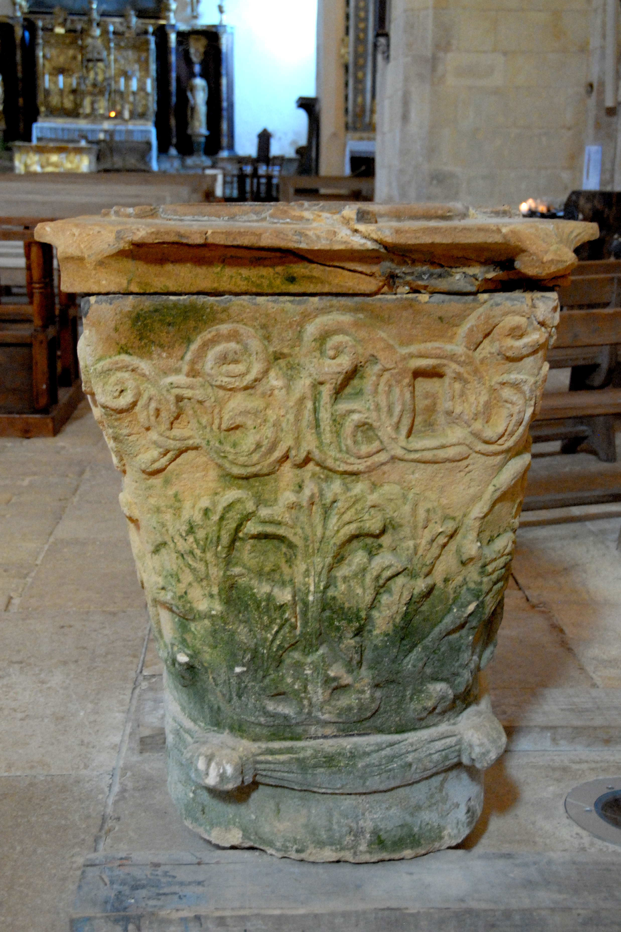 St.-Avit-Sénieur, Taufstein, romanisches Relief